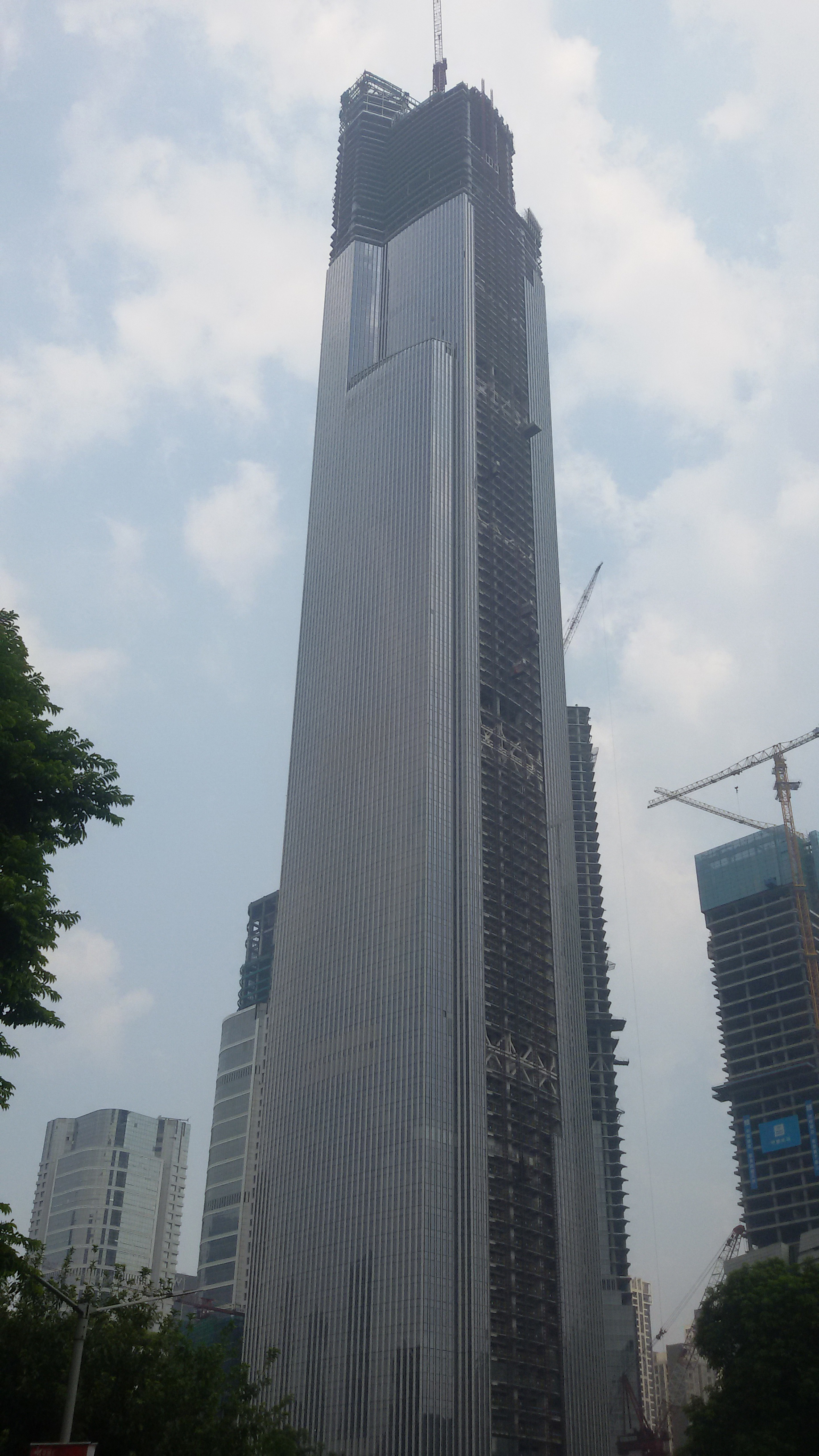 粵語: 喺度起緊嘅廣州周大福金融中心